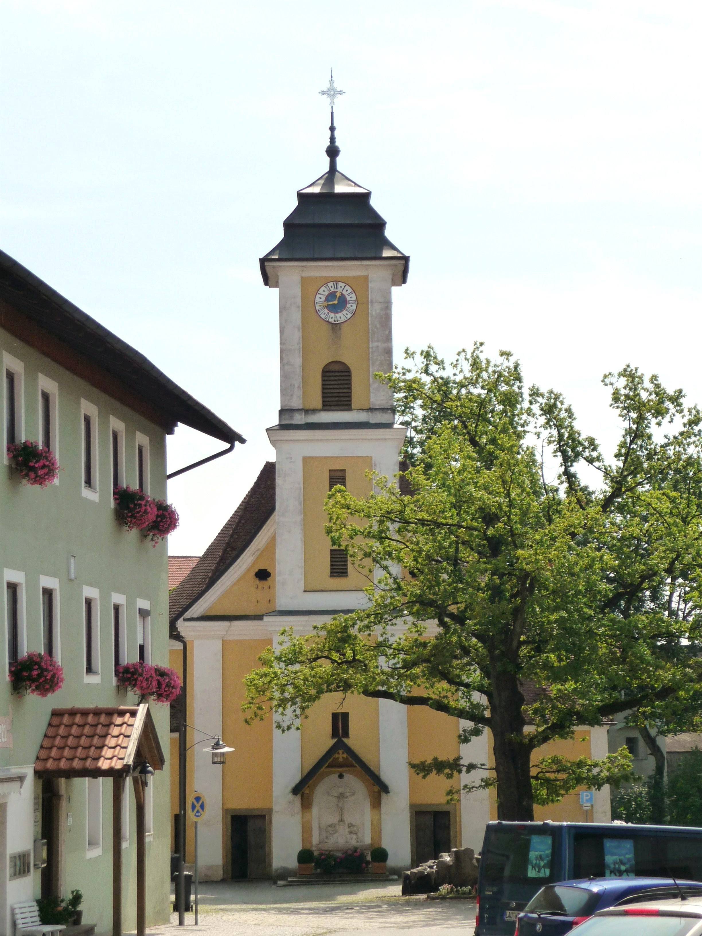 Die alte Pfarrkirche St. Georg in Mitterfels mit Friedenseiche im Vordergrund